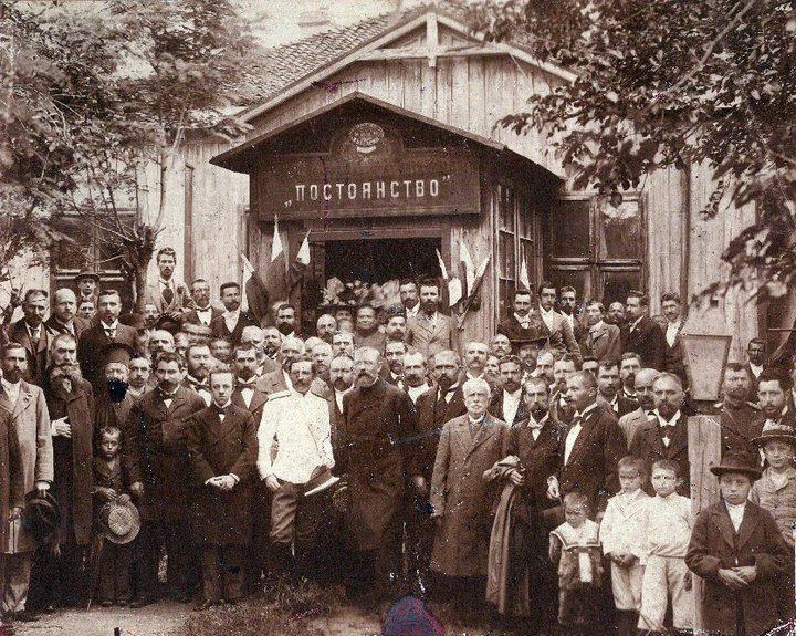 Читалище